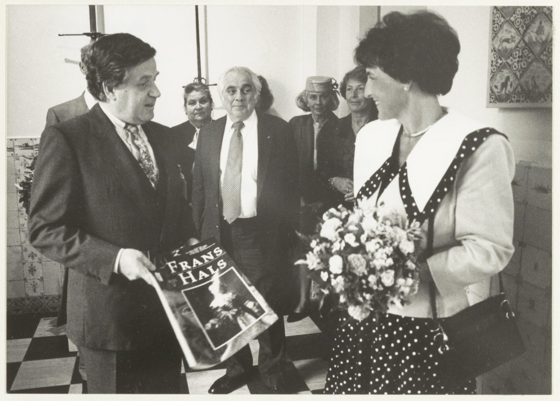 CollectieCollectie Fotoburo de BoerInventarisnummerNL-HlmNHA_54031489NL-HlmNHA_1478_32369KBeschrijvingFrans Halstentoonstelling in het gelijknamige museum. Bezoek van H.K.H. Prinses Margriet. Links museumdirecteur Dick Snoep.FotonummerNL-HlmNHA_1478_3194DocumenttypeHistorieprenten, tekeningen en foto'sVervaardigerBoer, Poppe de Soort vervaardigerFotograaf Interieur/ExterieurinterieurAnnotatiesHD120590PersonenH.K.H. Prinses Margiet Functies personenKoninklijk huis LandNederland ProvincieNoord-Holland GemeenteHaarlem PlaatsHaarlem StraatGroot Heiligland GeografischCentrum Datering gebeurtenis12-05-1990TechniekFoto Trefwoordenmusea, Koninklijke bezoeken